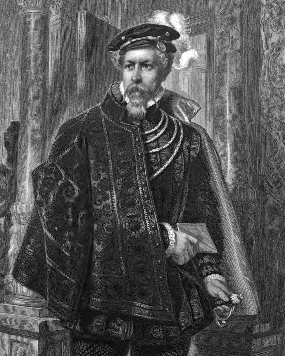 Mortimer aus Friedrich Schillers Drama Maria Stuart, als Stahlstich gestochen um 1859 nach einer Zeichnung von Arthur von Ramberg